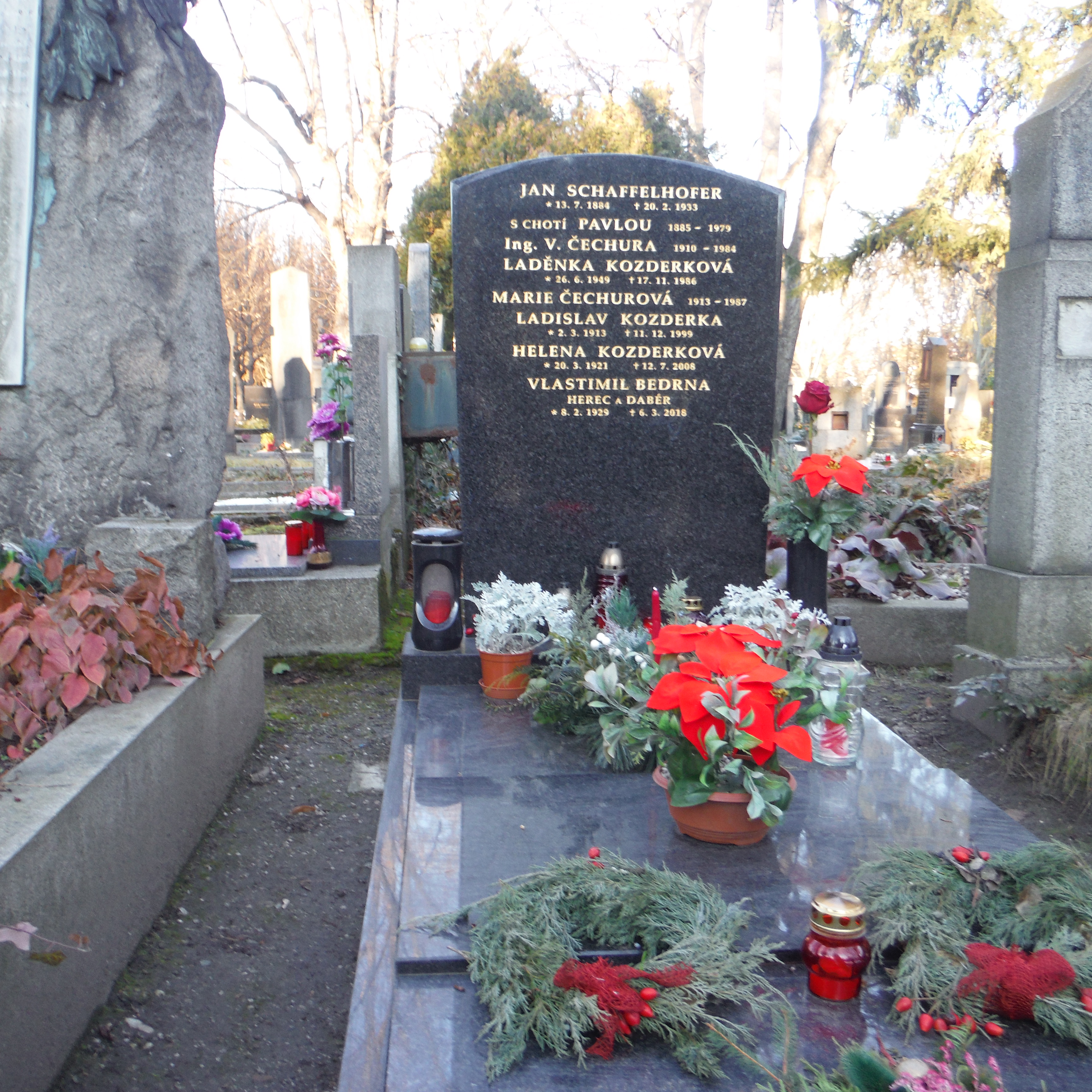 hrob L. Kozderkové a V. Bedrny na Vinohradském hřbitově v Praze